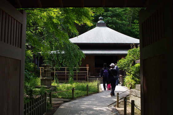 東慶寺の本堂。